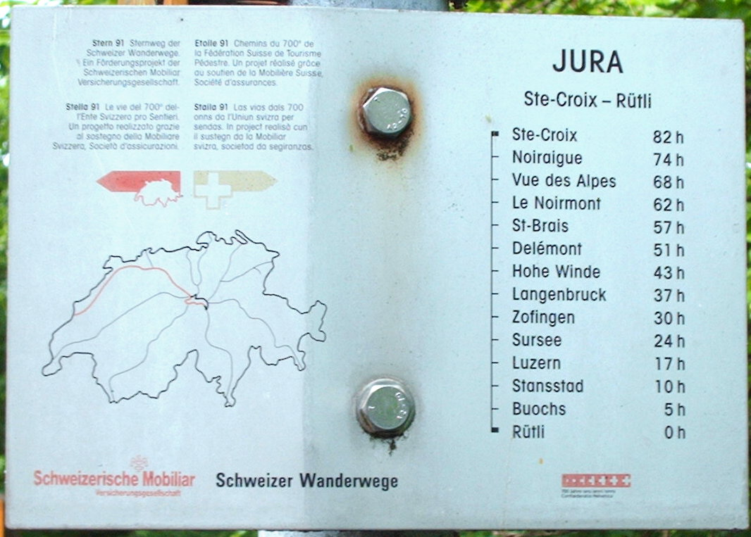 Wegweiser für Sternweg Schweiz 1991, Olten